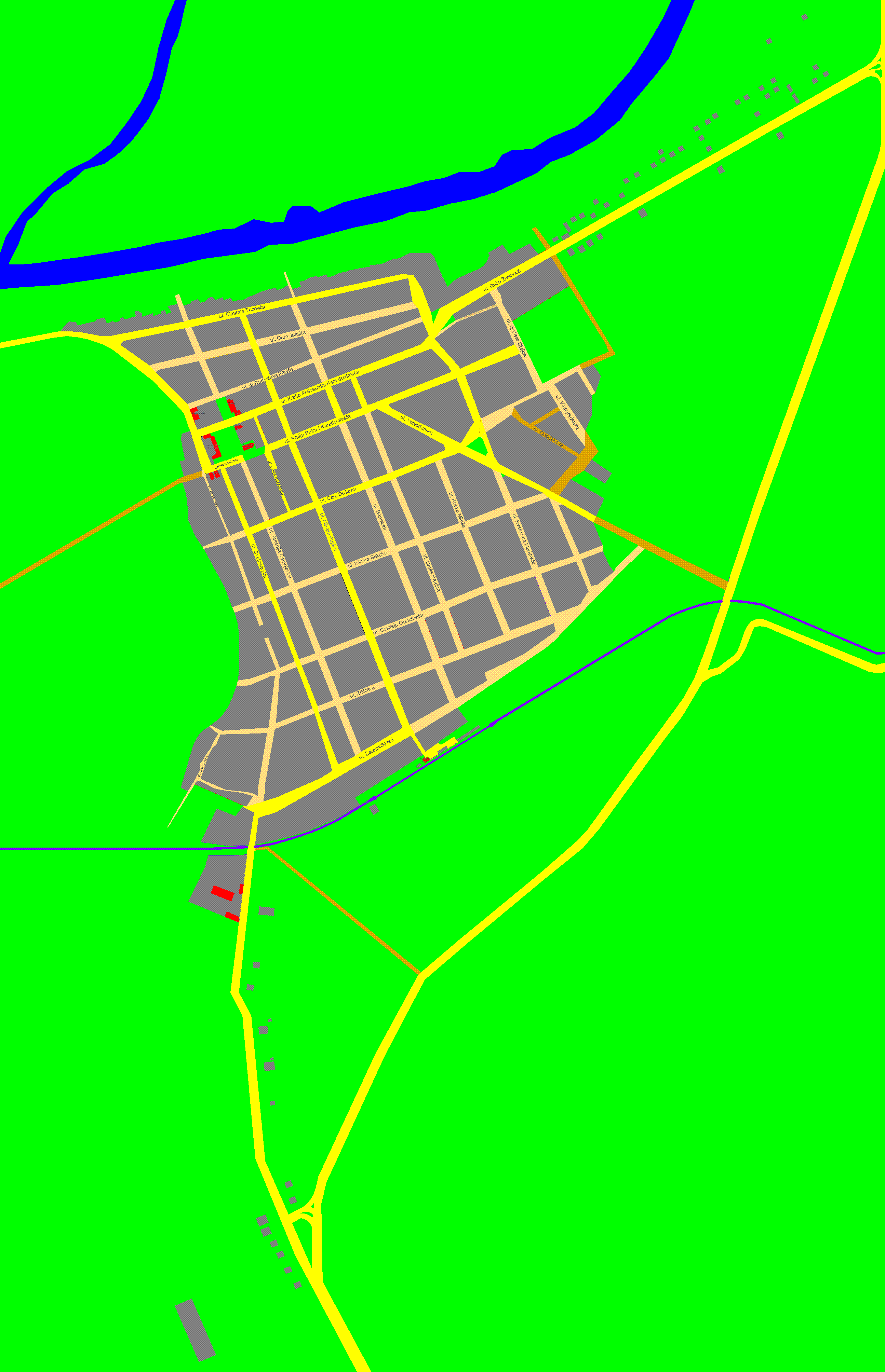 Мапа Перлеза